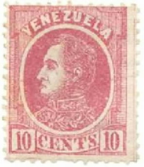 Efigie de Simón Bolívar del año 1880 primera estampilla postal cin la efigie de libertador y primera perforada. Impresas por American Bank Note Company. New York. Grabadas por Marcos diversos, perforacion 12. Nª de catálogo * según Aurelio Blanco: 36 Blanco, Aurelio. 2009: Venezuela Catálogo especializado de estampillas. Caracas. 183p. ISBN 980-300-176-0